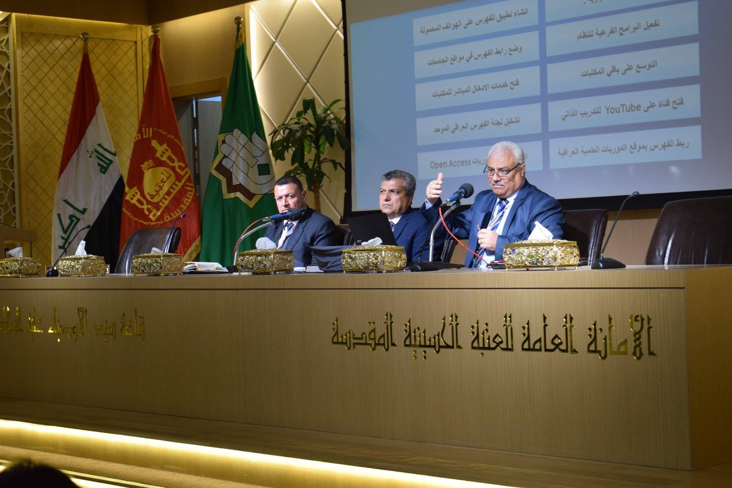 محاضرة الاستاذ الدكتور طلال الزهيري في ندوة الفهرس العراقي الموحد